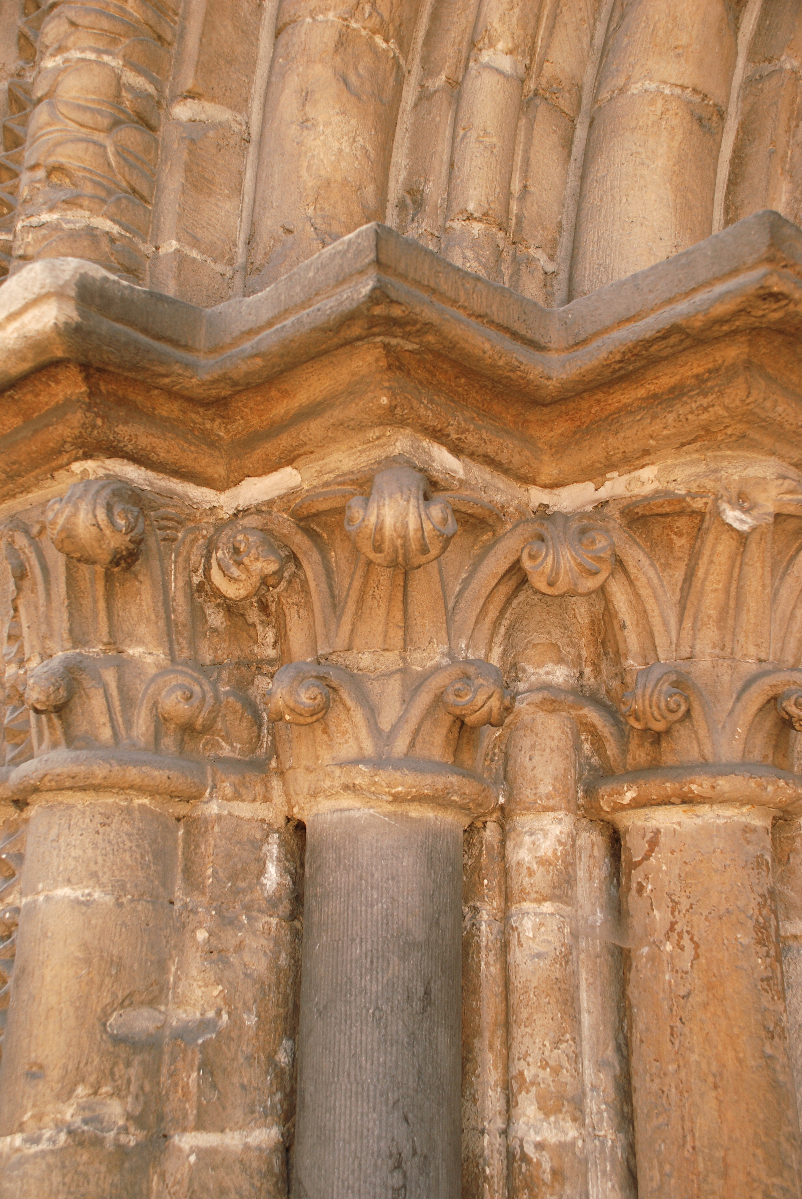 Belgique - Louvain - Chapelle de la Porte Romane